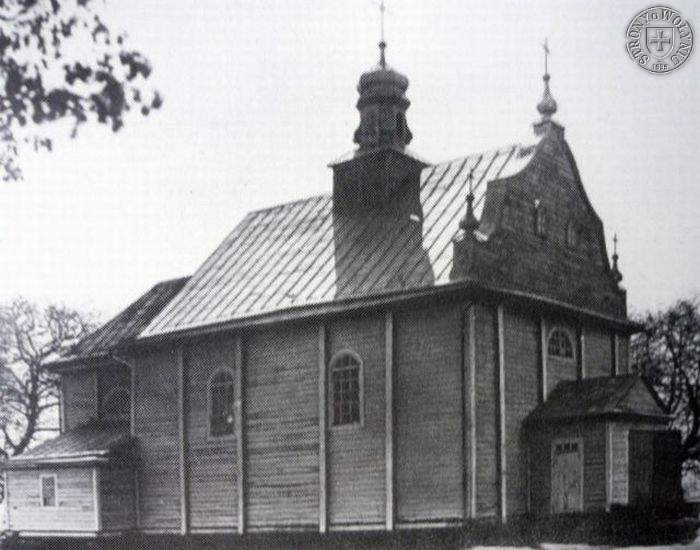 2. Kościół parafialny pw. Trójcy Świętej i Św. Jana Chrzciciela w Torczynie.jpg: костел в торчині